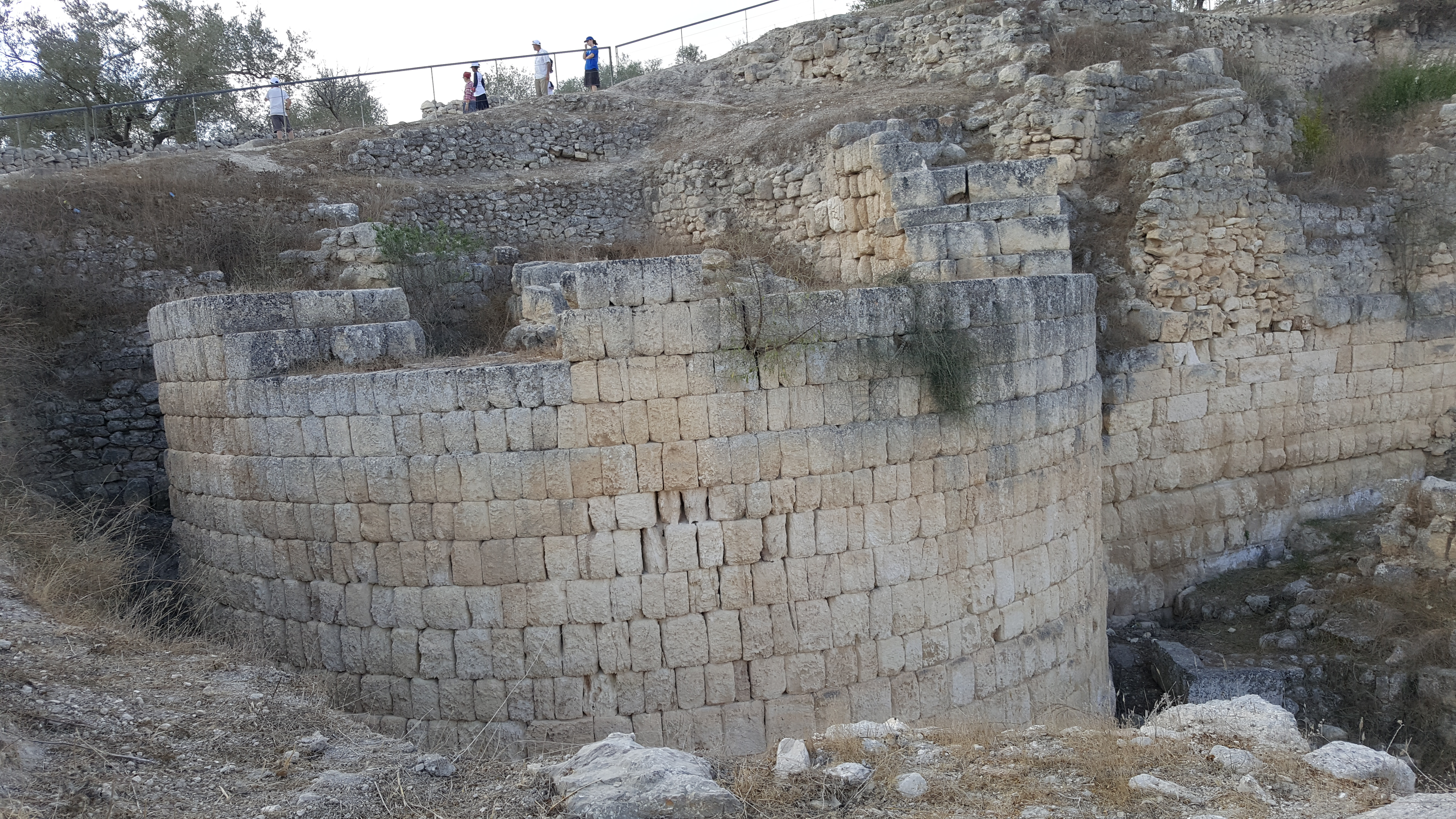 עיר קדומה בארץ ישראל. בירת ממלכת ישראל במאות ה-9 וה-8 לפנה"ס.